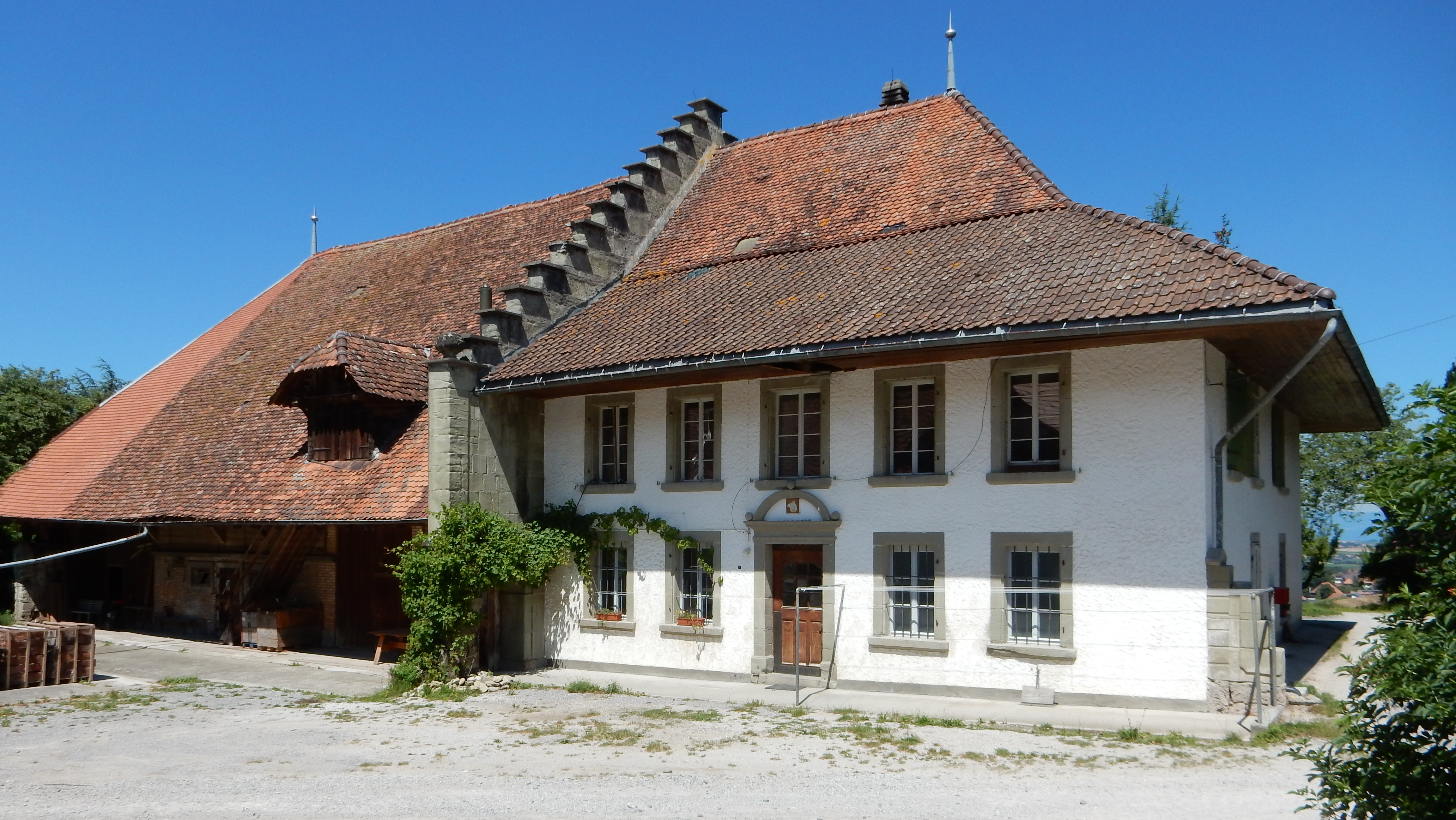 Albligen, Kurriedweg 4: Gutshof (1727)